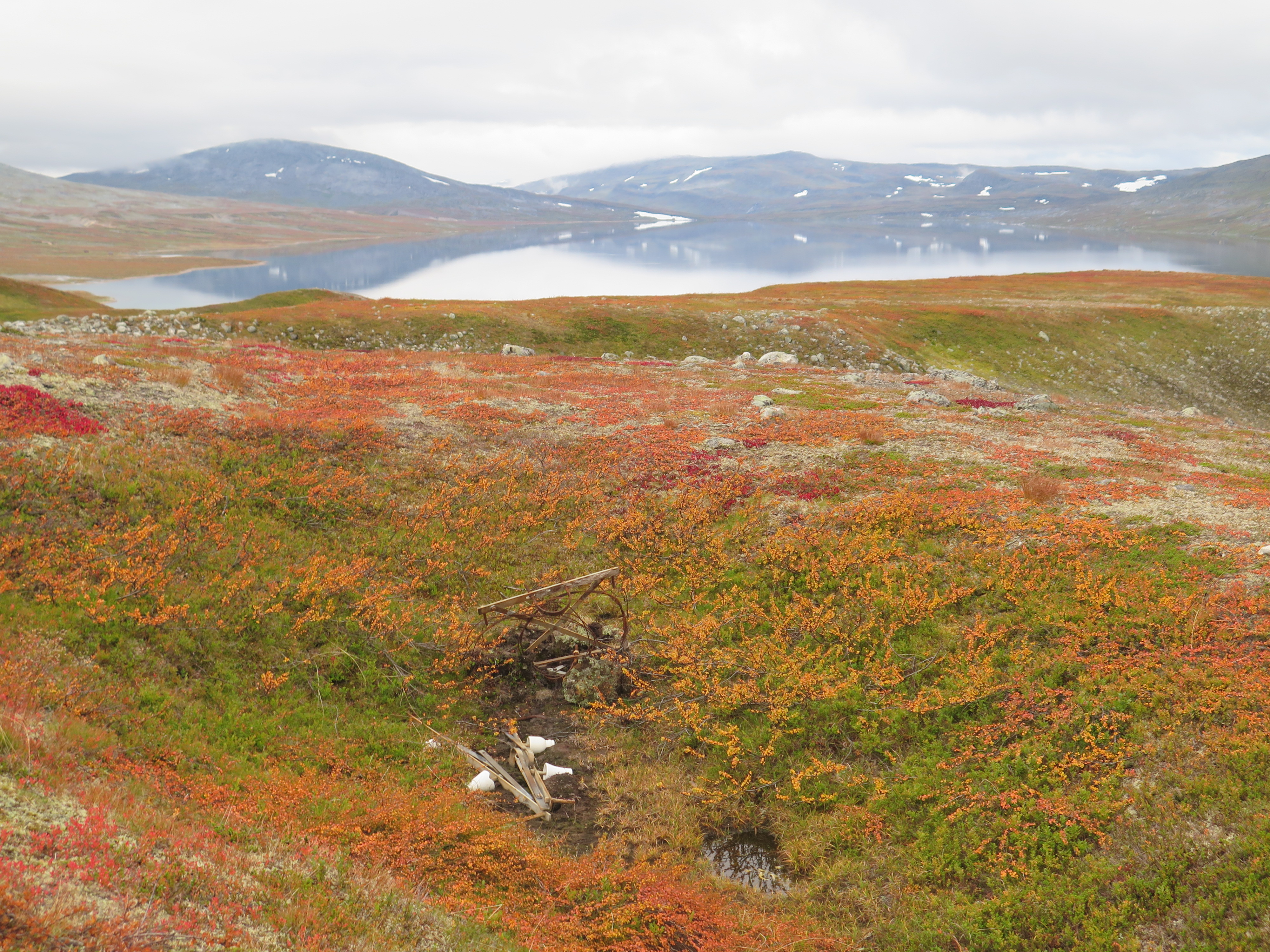 Langs Telegrafruta er det mange spor etter telegraflinja som ble anlagt i 1867